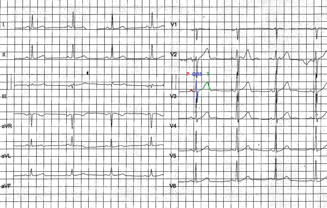 Normálny elektrokardiogram. Na jednom úseku sú farebne označené základné časti krivky - vlna P, komplex kmitov QRS a vlna T.